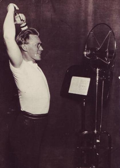 Josef Jan Kratochvíl - cvičení v rozhlase